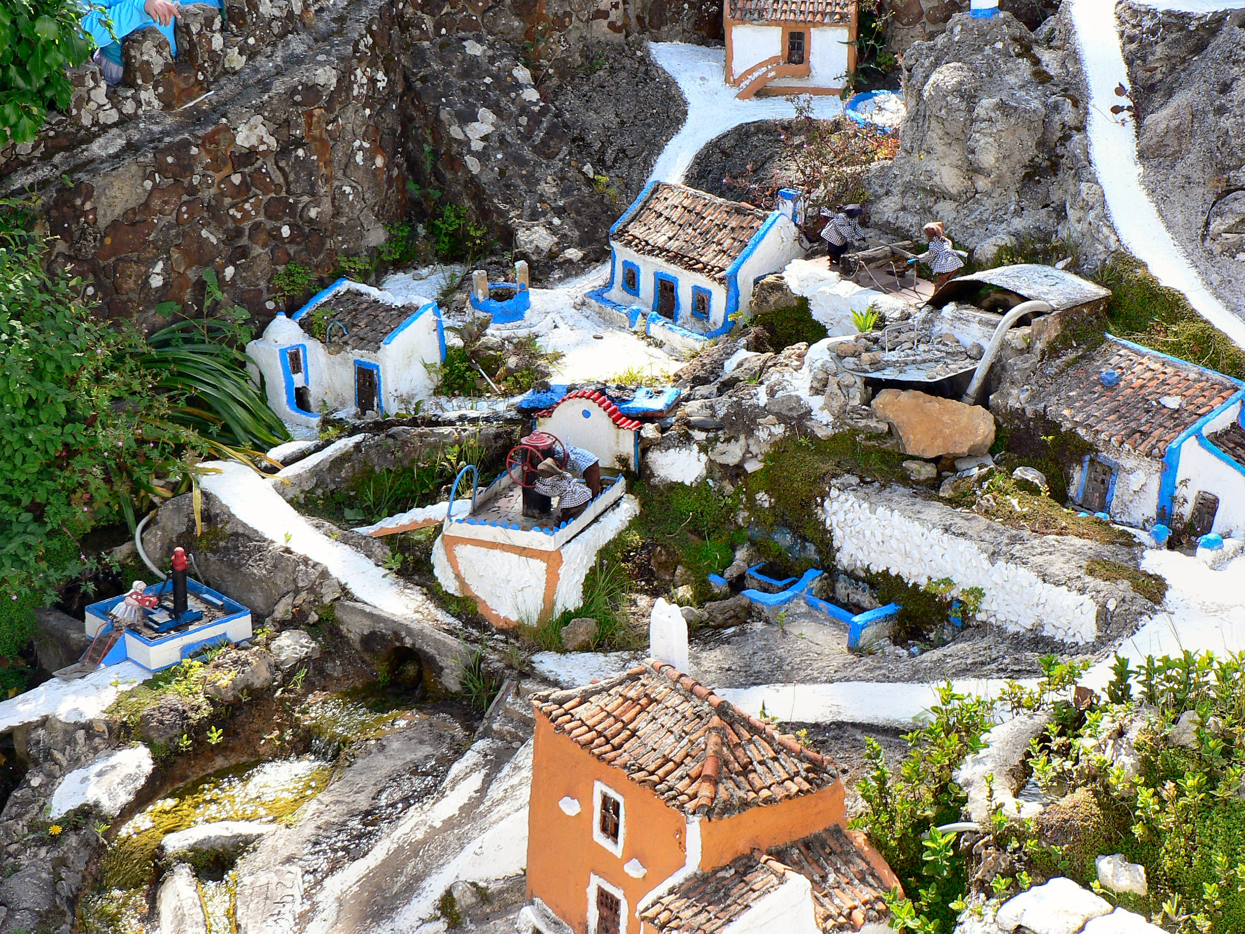 Aldeia típica de José Franco Autor: Paulo Juntas